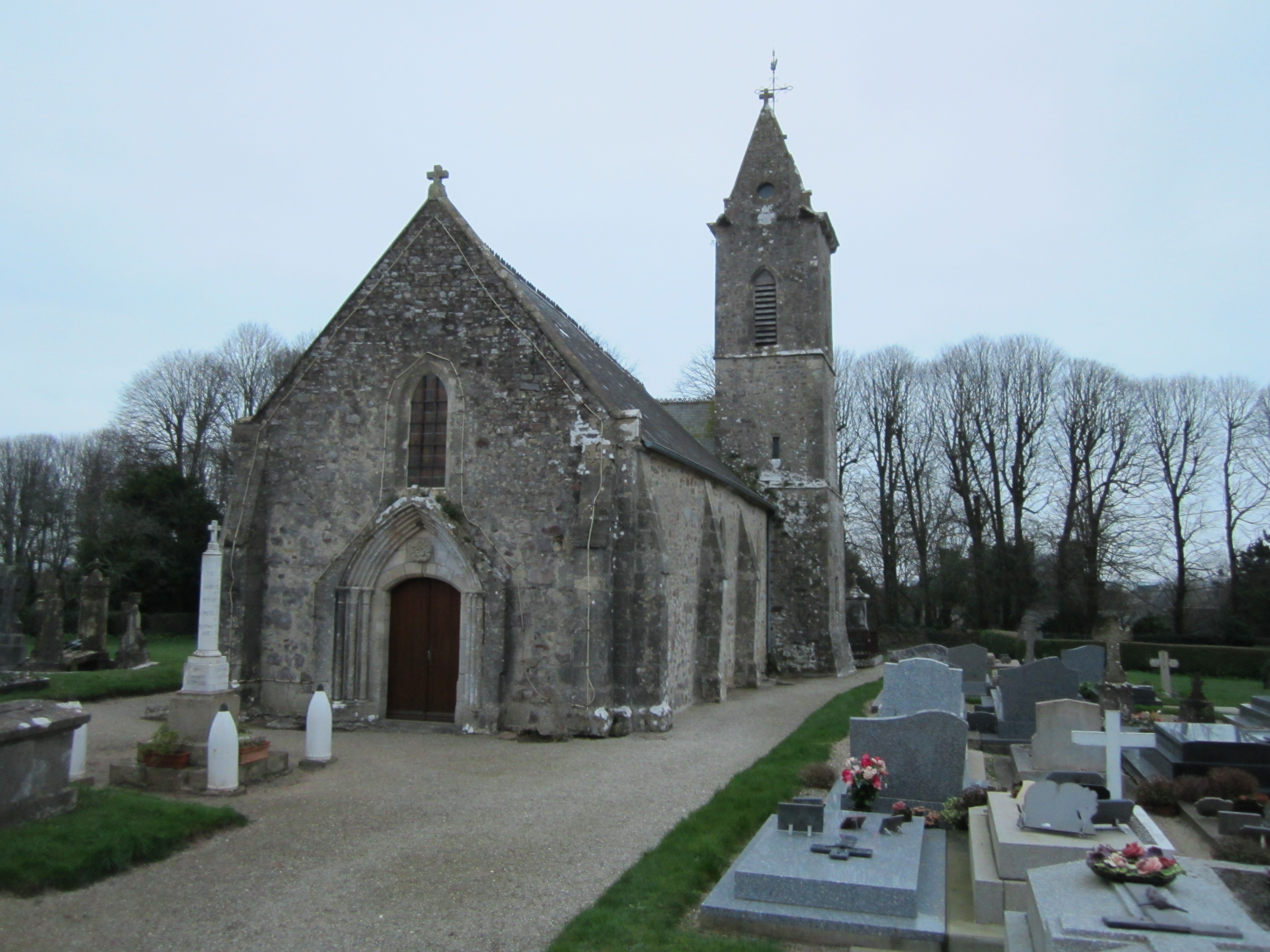 Église Saint-Pierre d'Aumeville-Lestre